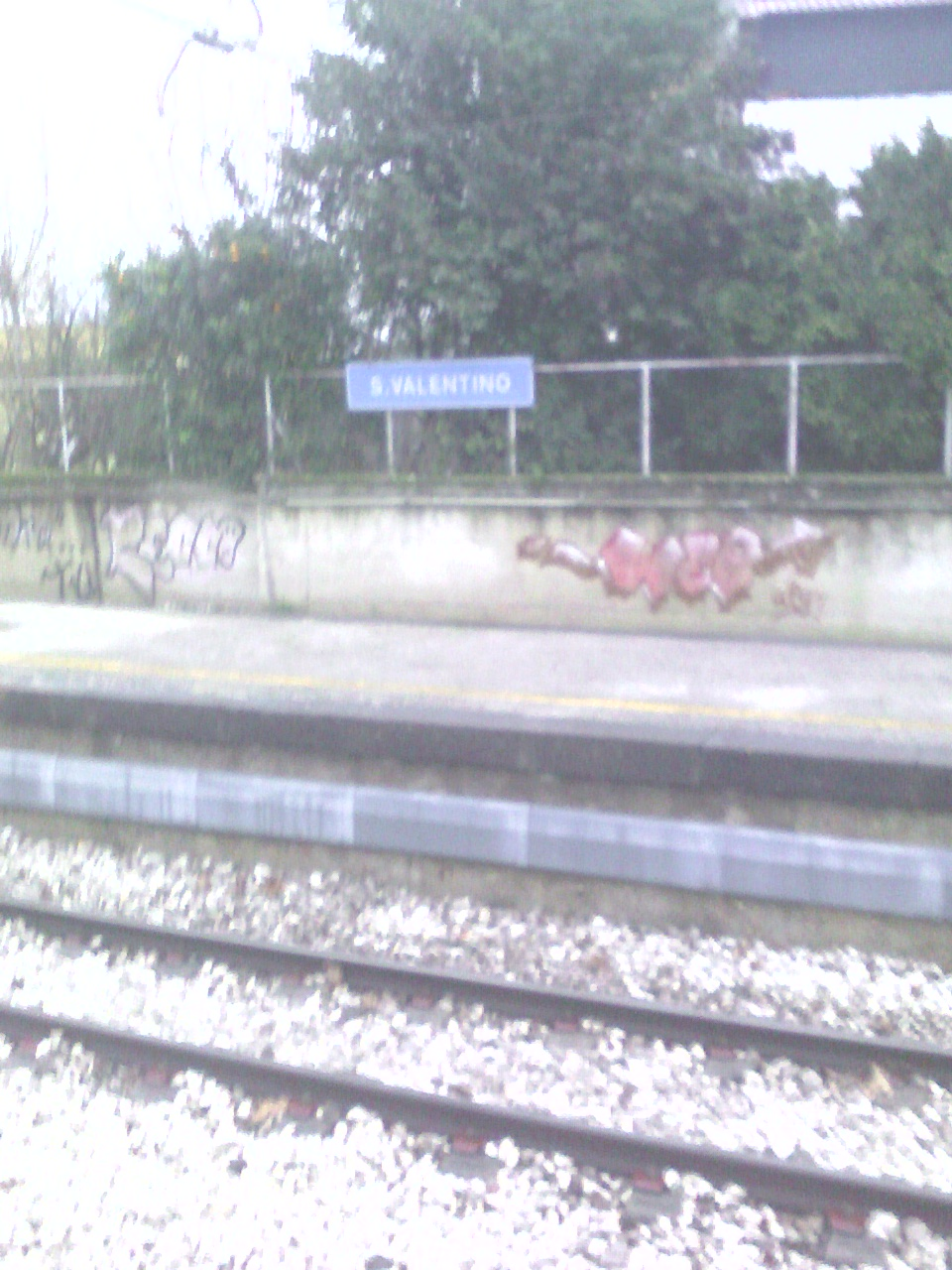 Cartello indicativo della stazione di San Valentino